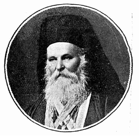 Conon Aramescu Donici - episcopul Huşilor, România, 1910